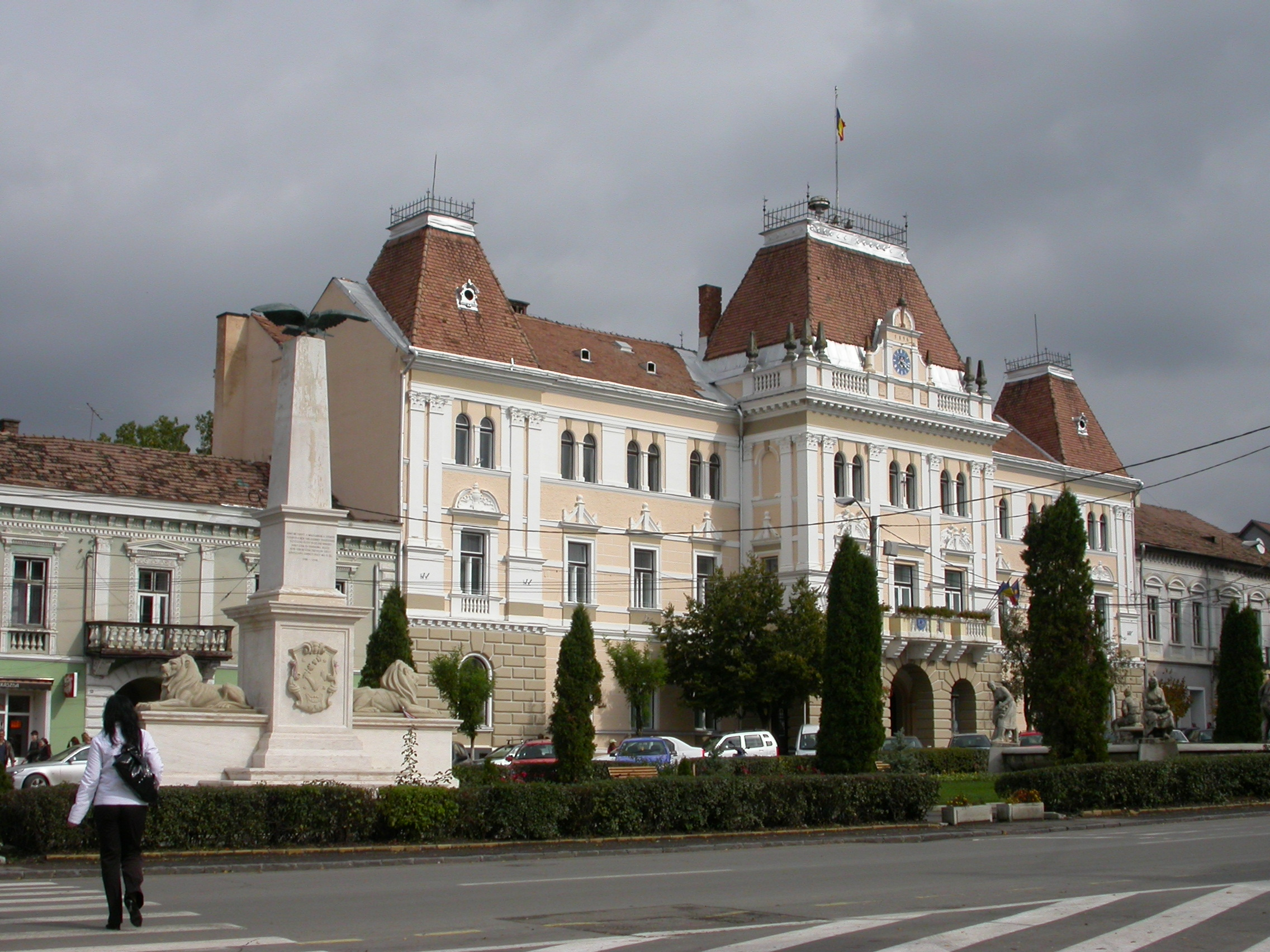 Fostul sediu al comitatului Odorhei, azi primărie, 1896